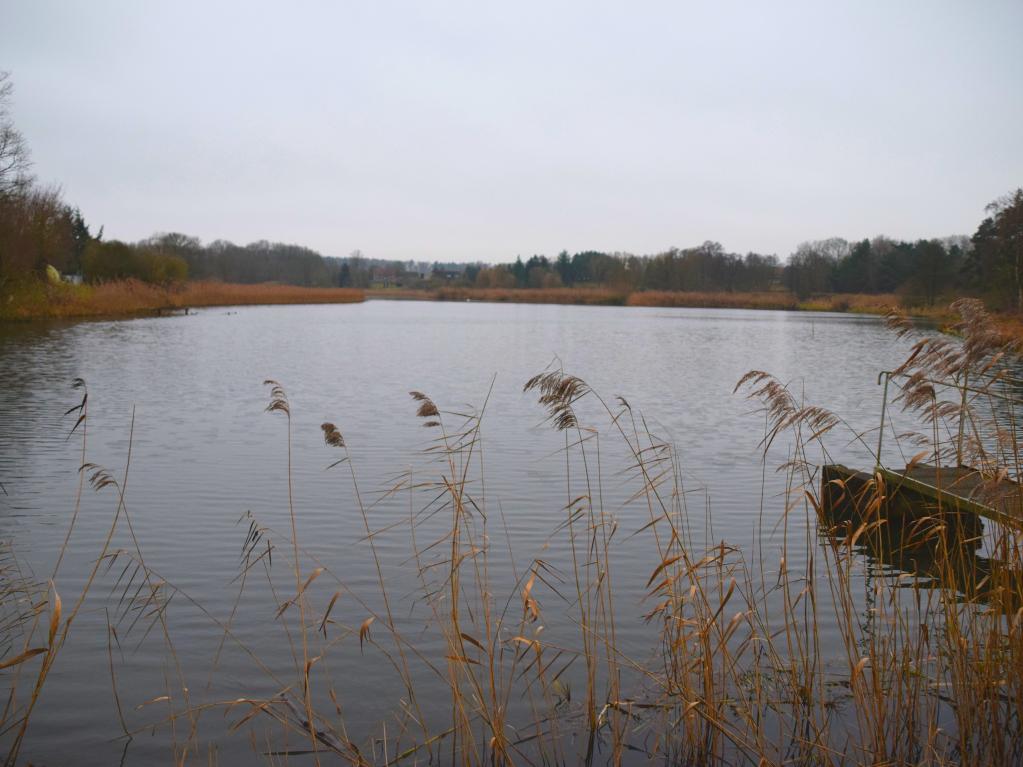 Fischteich in Booßen, Frankfurt (Oder), Deutschland